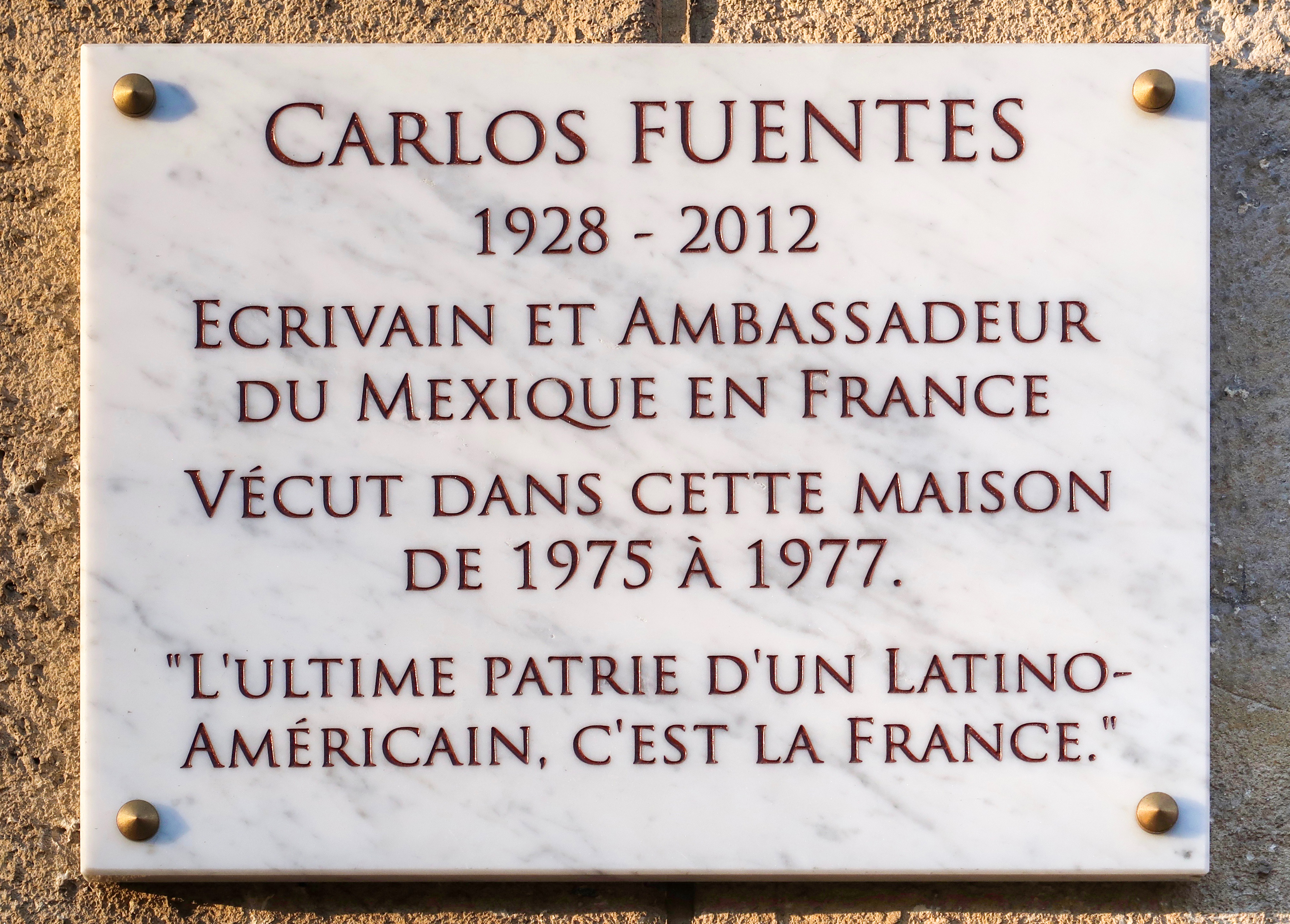 Plaque en hommage à Carlos Fuentes, 20 avenue du Président-Wilson (Paris, 16e).